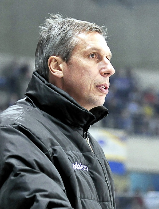 Markus Berwanger, Trainer der Dresdner Eislöwen bei seinem Debüt